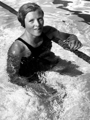 Willy den Ouden won zilver bij het zwemmen op de 100m vrije slag in 1 minuut 07.6 sec. tijdens de Olympische spelen in Los Angeles 7 augustus 1932.